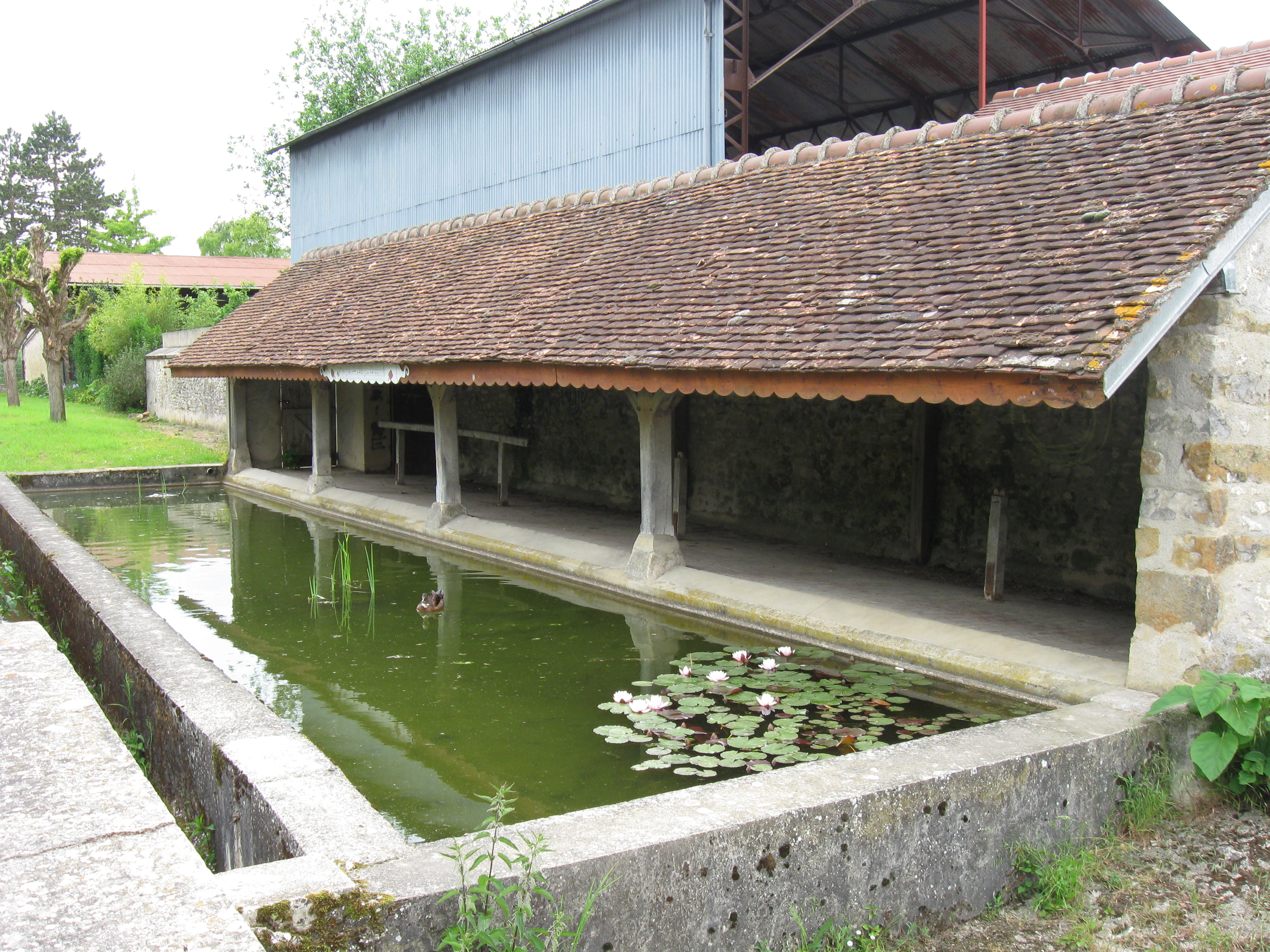 Lavoir sur le ru de Mons à Thénisy. (Seine-et-Marne, région Île-de-France).